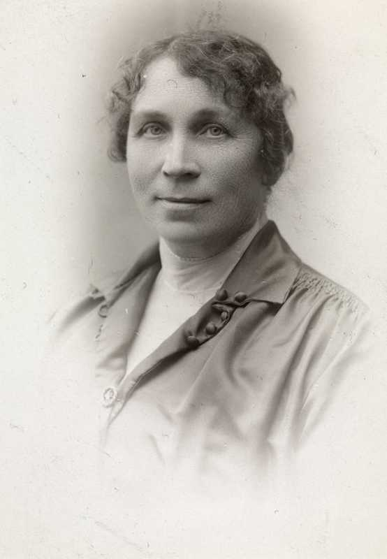 Ragna Hørbye født Heyerdahl var politiker for Frisinnede Venstre og ga ut to novellesamlinger..